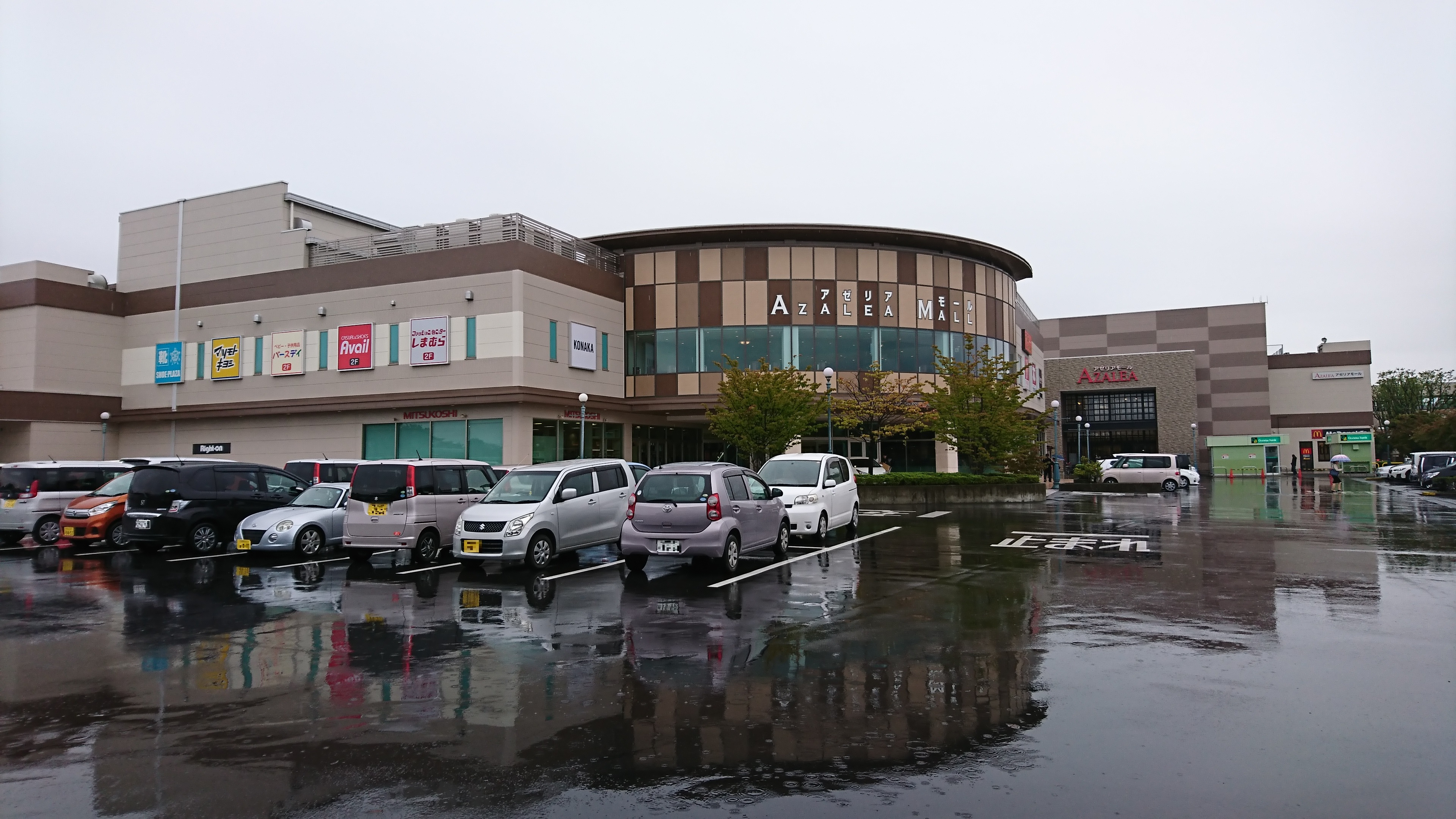 アゼリアモール外観